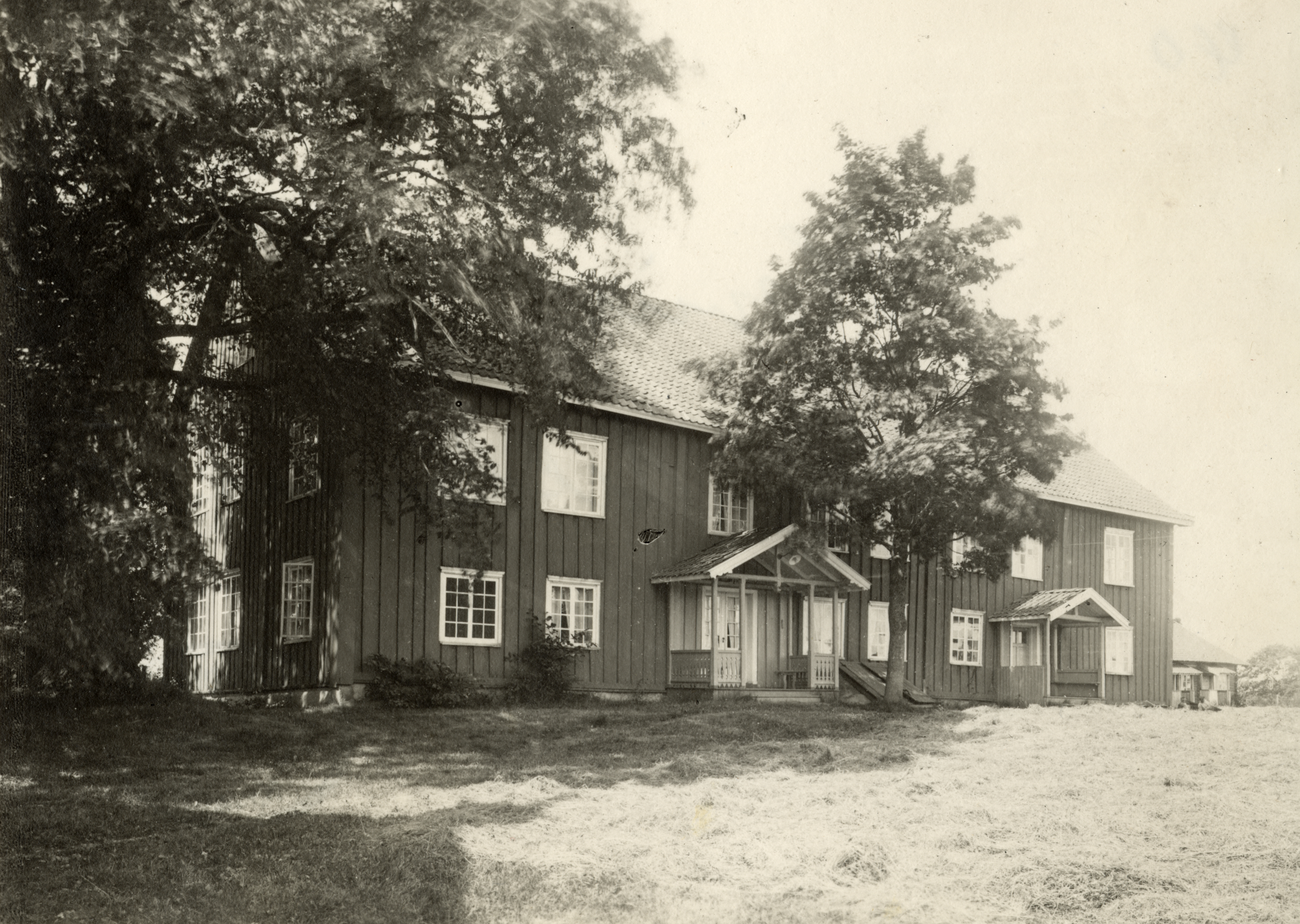 Hovin gård, Østre i Hovin, Akershus Oppført 1750-1800. Skrivergård.